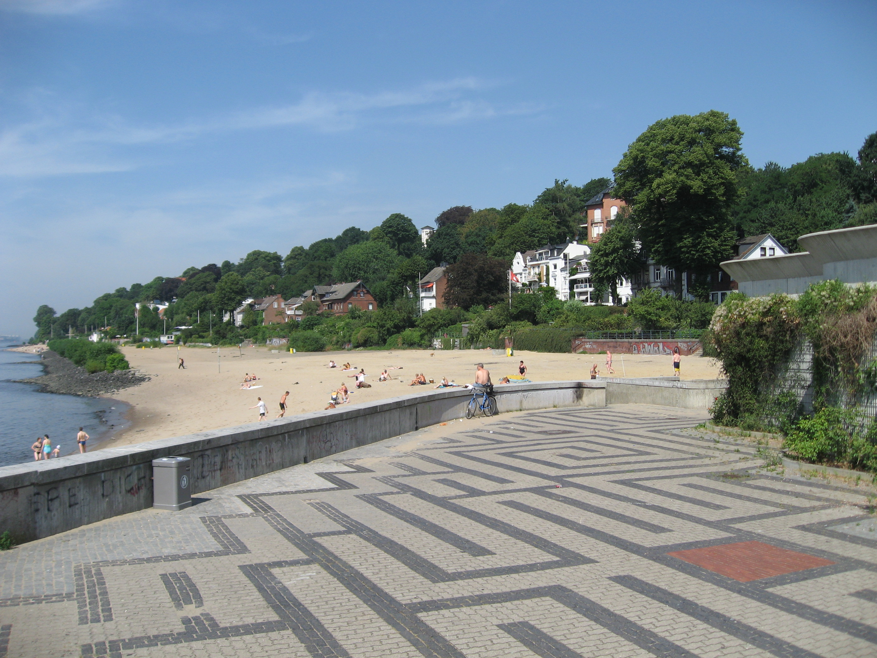 Strand von Övelgönne und Labyrinth vor dem Lüftungsbauwerk der A 7 für den darunter liegenden neuen Elbtunnel